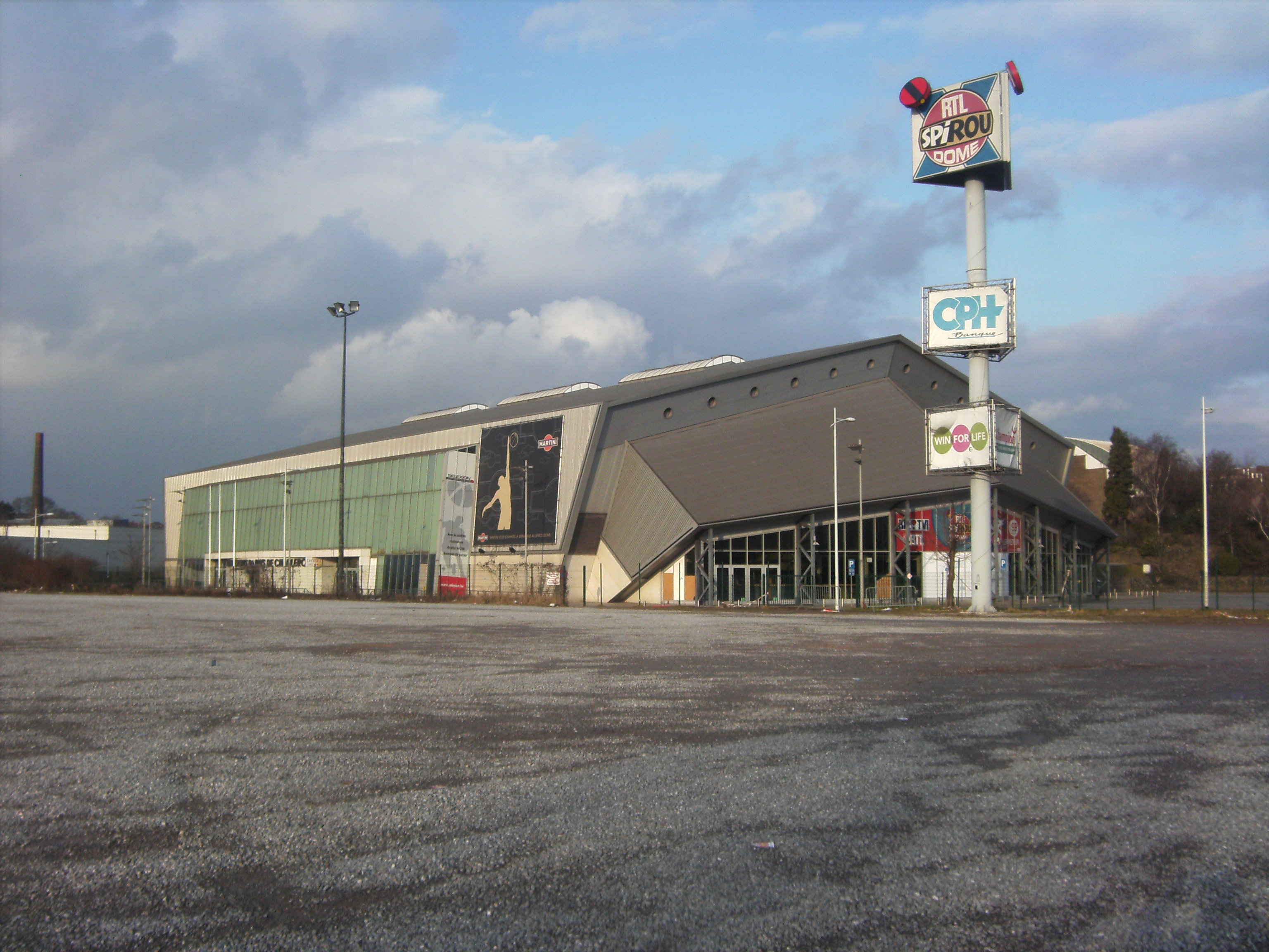 Charleroi - Spiroudôme ou Palais des sports du Pays de Charleroi. Salle polyvalente, essentiellement salle du Spirou Basket Club.